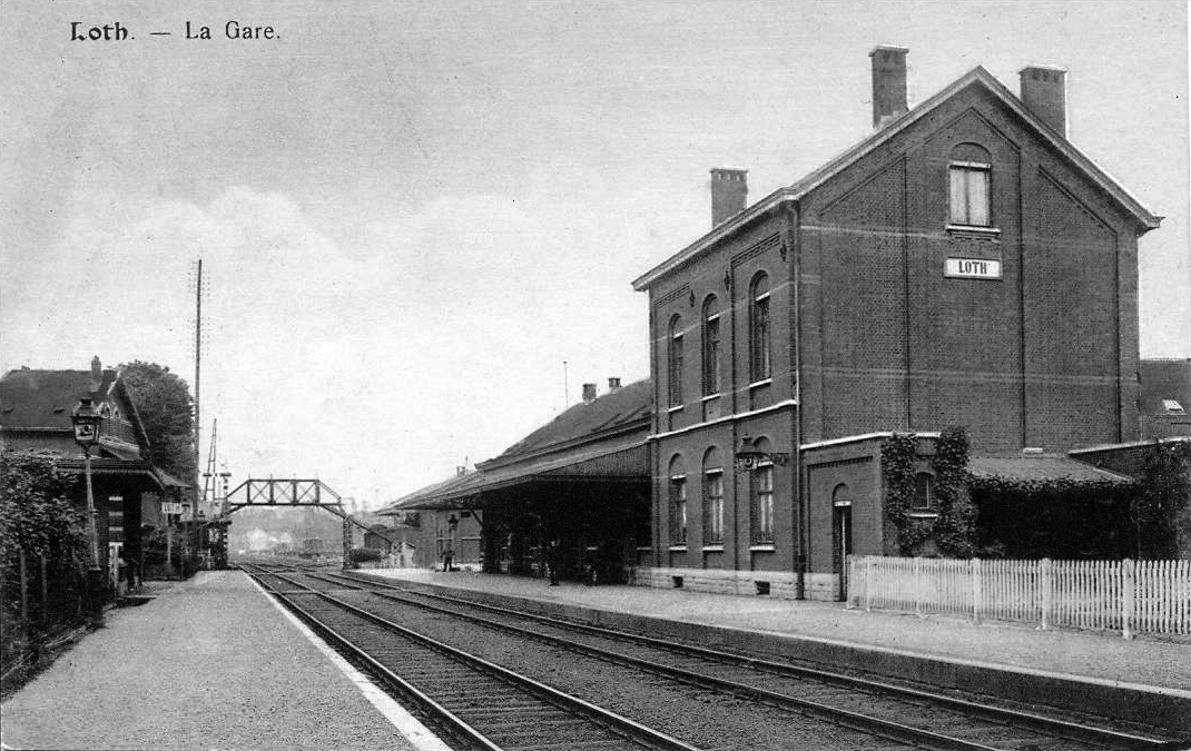 L'intérieur de la gare de Lot, en Belgique, vers 1900.